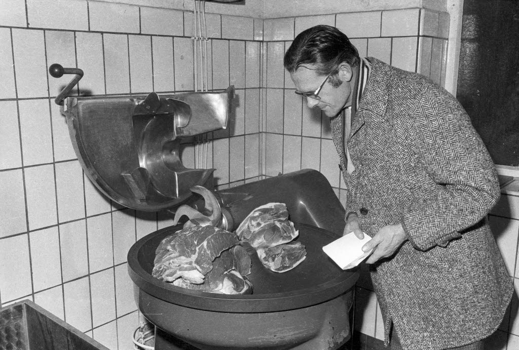 Fleischbeschauer im Schlachthof